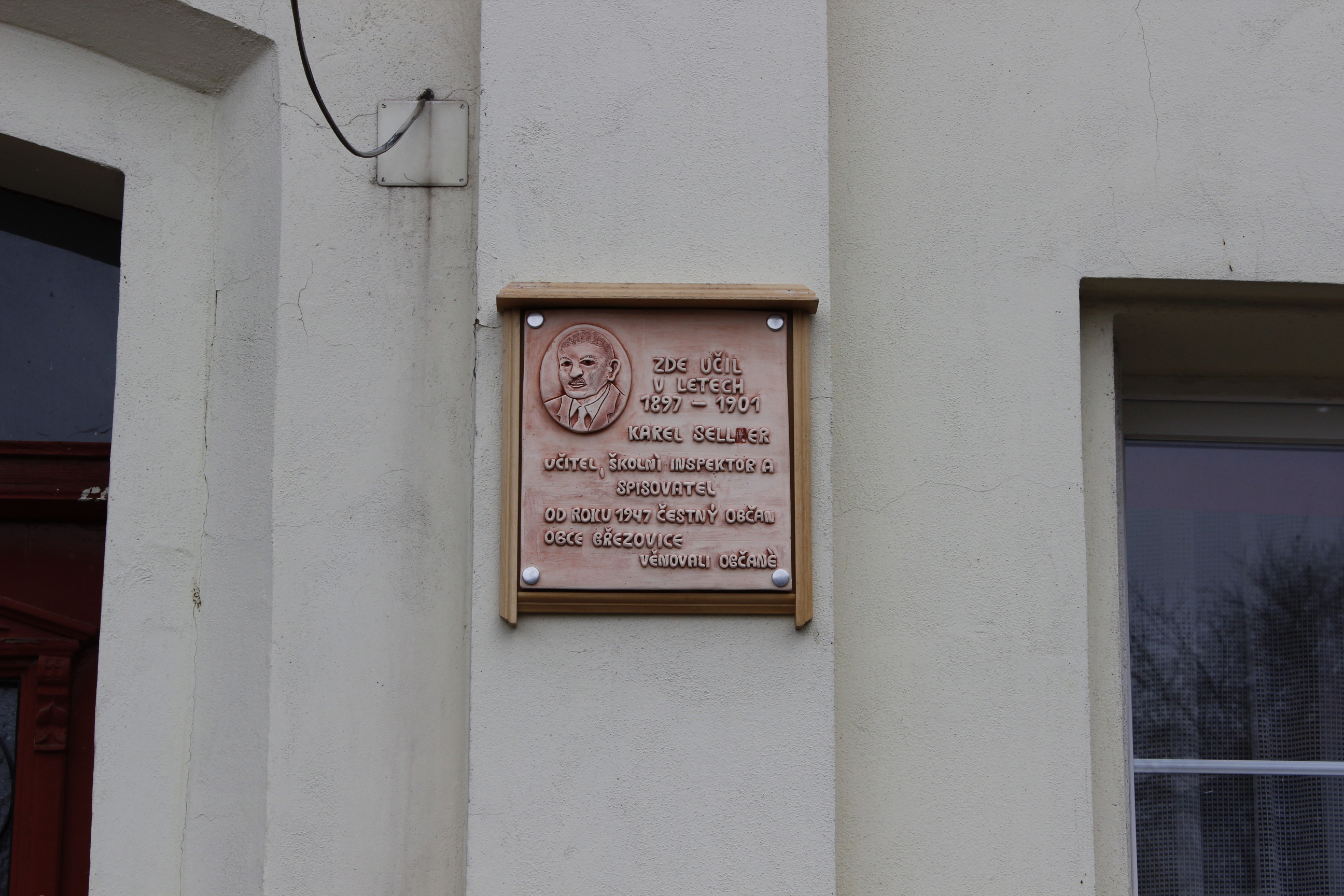 Pamětní deska Karla Sell(n)era na budově bývalé školy v Březovicích.